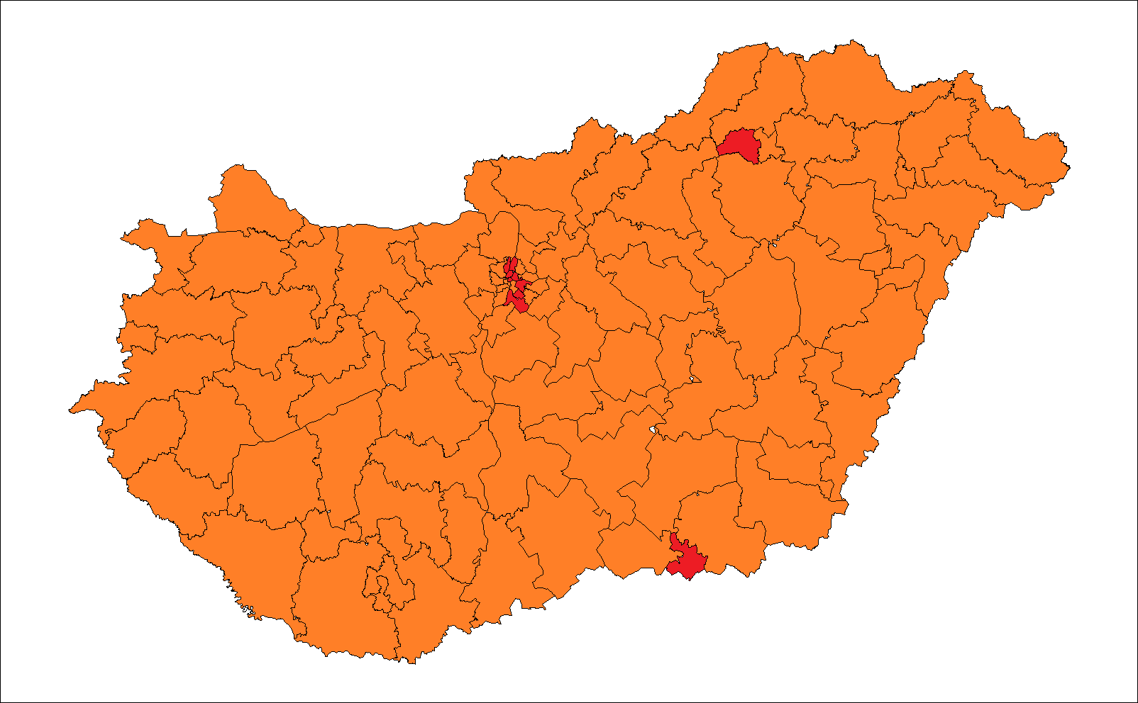 A 2014-es országgyűlési választás egyéni eredményei az NVI adatai alapján ██ = Fidesz (96) ██ = MSZP–EGYÜTT–DK–PM–MLP (10)